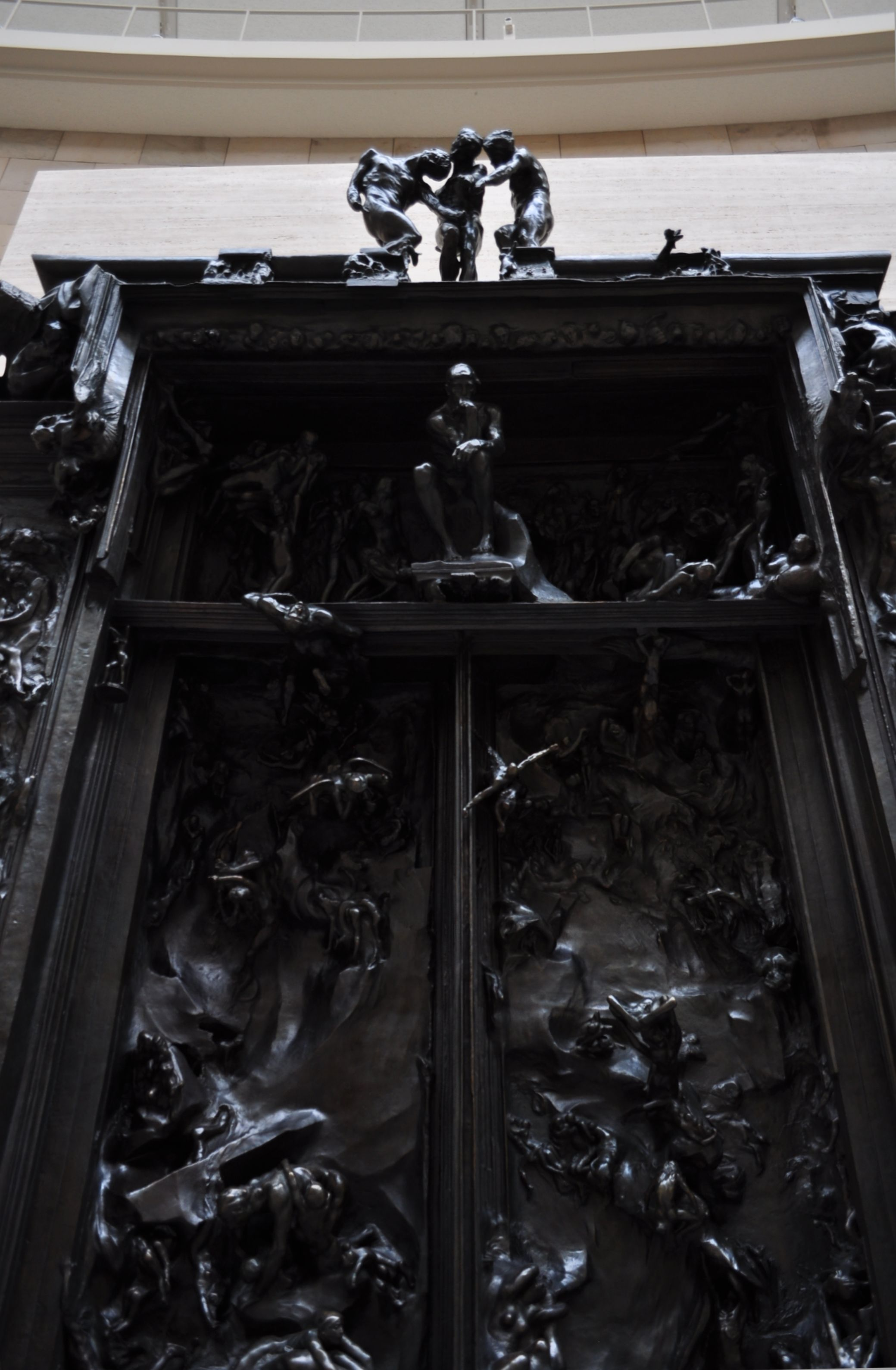 2014年7月16日撮影